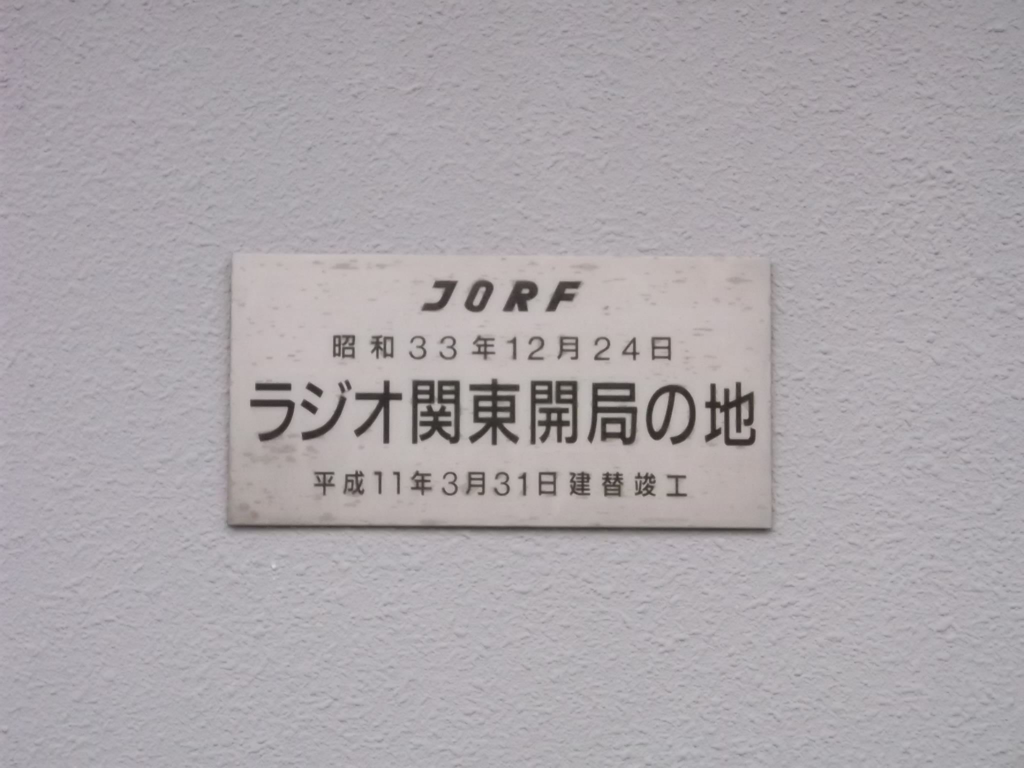 RFラジオ日本野毛山無線基地局に設置されているラジオ関東開局の地を記すプレート